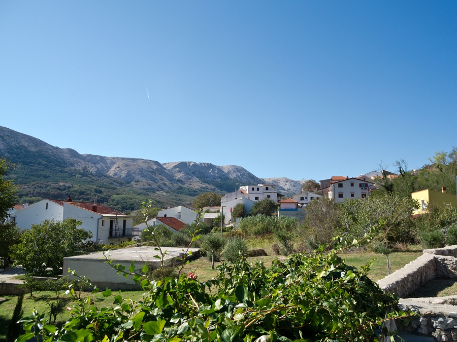 Crkva sv. Lucije u Jurandvoru